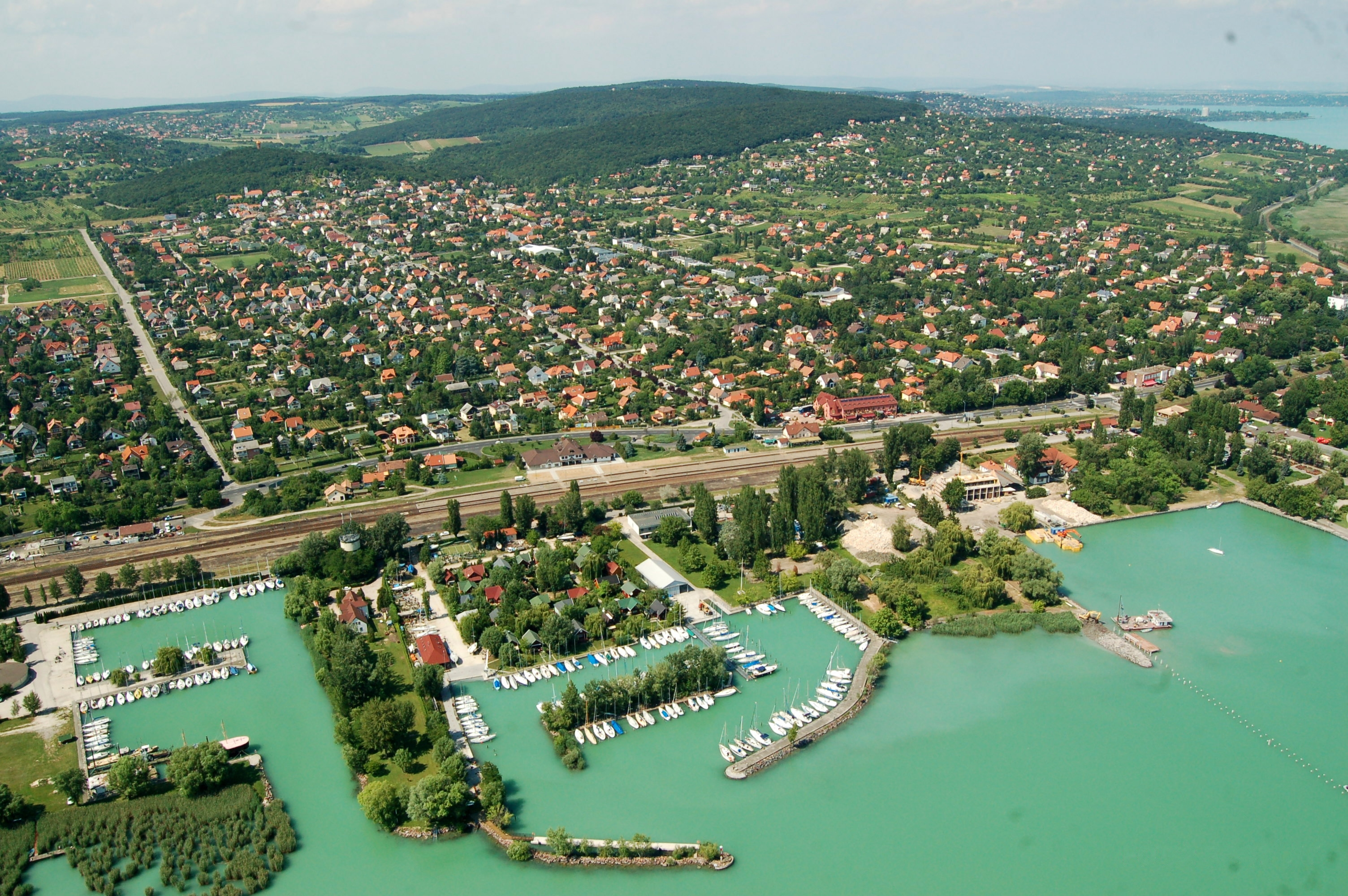 A felvételen az alsóörsi vitorlás telepek láthatók